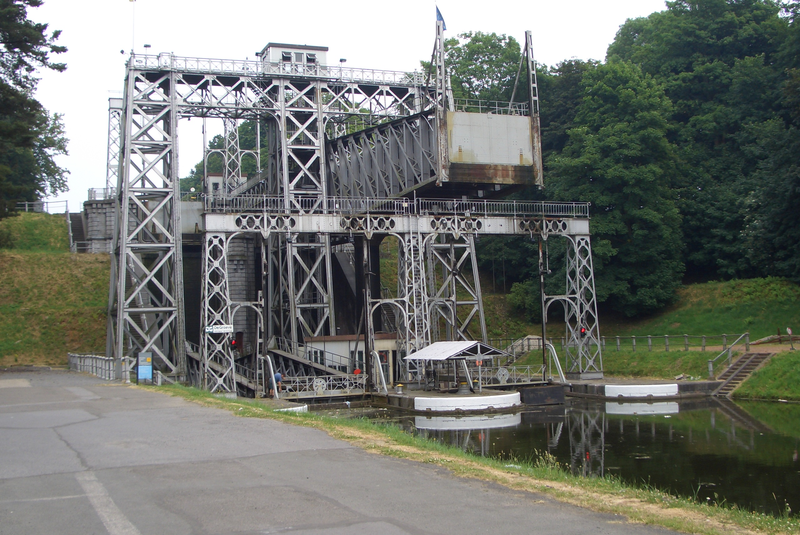 Eines von 4 alten hydraulischen Hebewerken im Canal du Centre, Provinz Hennegau, Belgien. Quelle: selbst aufgenommen am 26.06.2005 Lizenz GNU FDL